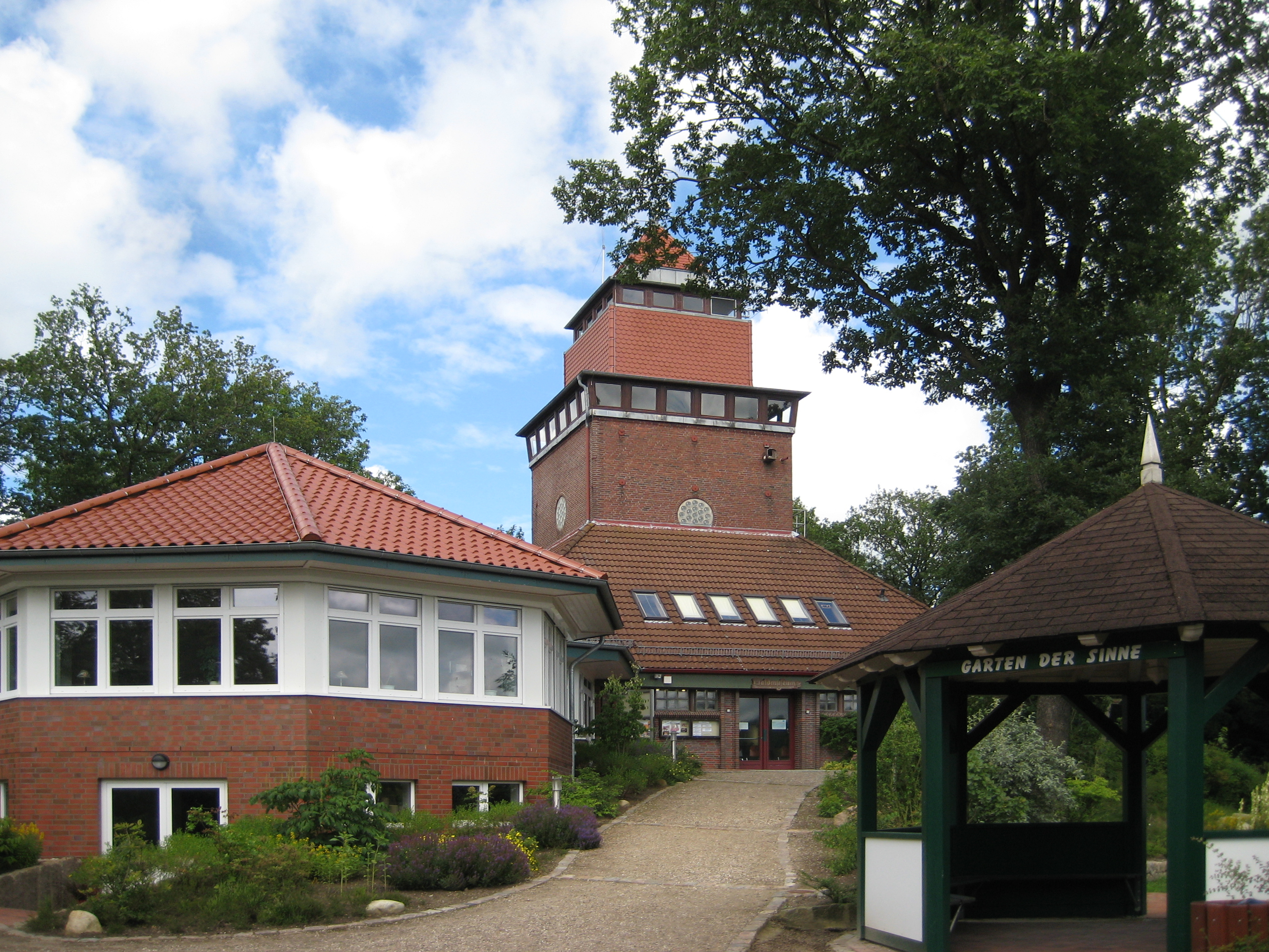 Naturerlebnisraum Burg (Dithmarschen) am Waldmuseum